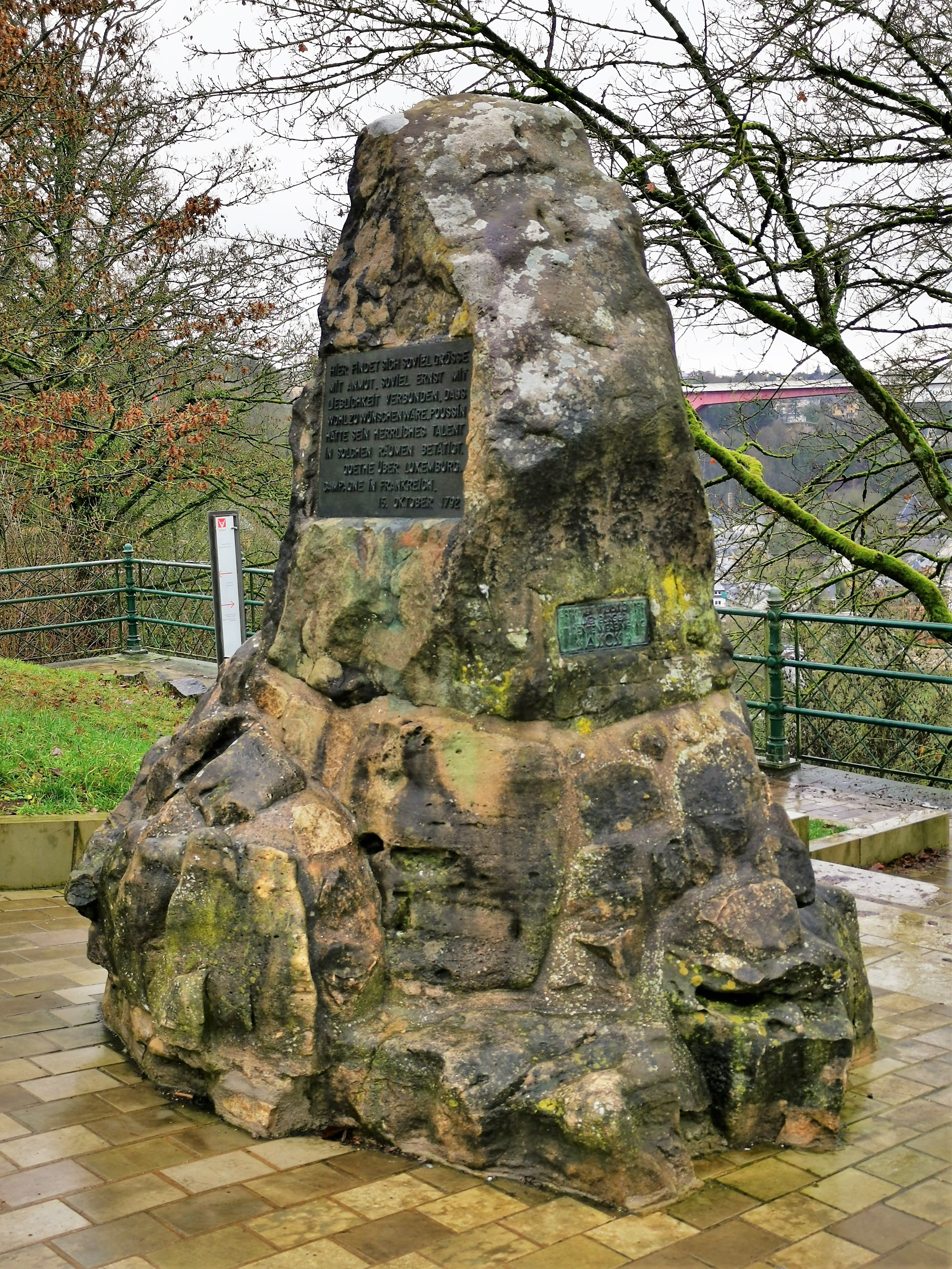 Luxembourg, rocher du Bock. Plaque commémorative en mémoire de Johann Wolfgang von Goethe, de séjour à Luxembourg en octobre 1792.